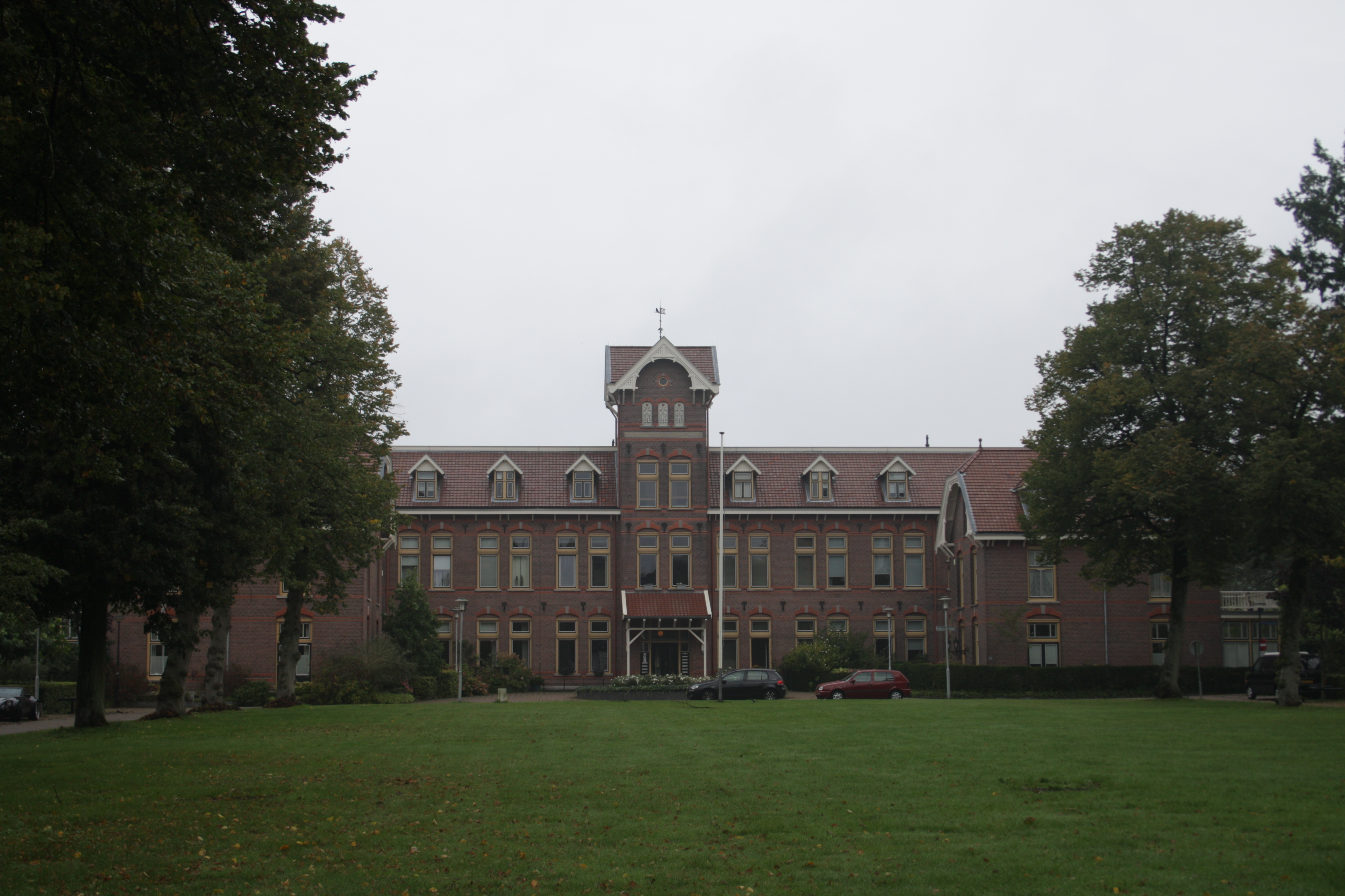 Amersfoort, Koningin Beatrixplantsoen. links nr 38 de directeurswoning; midden 16-36 het opvoedingsgesticht; rechts nr. 14 de adjunctdirecteurswoning.